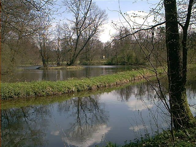 Teichansicht, Fürstlicher Park der Fürsten von Hohenzollern-Sigmaringen, Park im Stil der Englischer Landschaftsparks, 72505 Krauchenwies